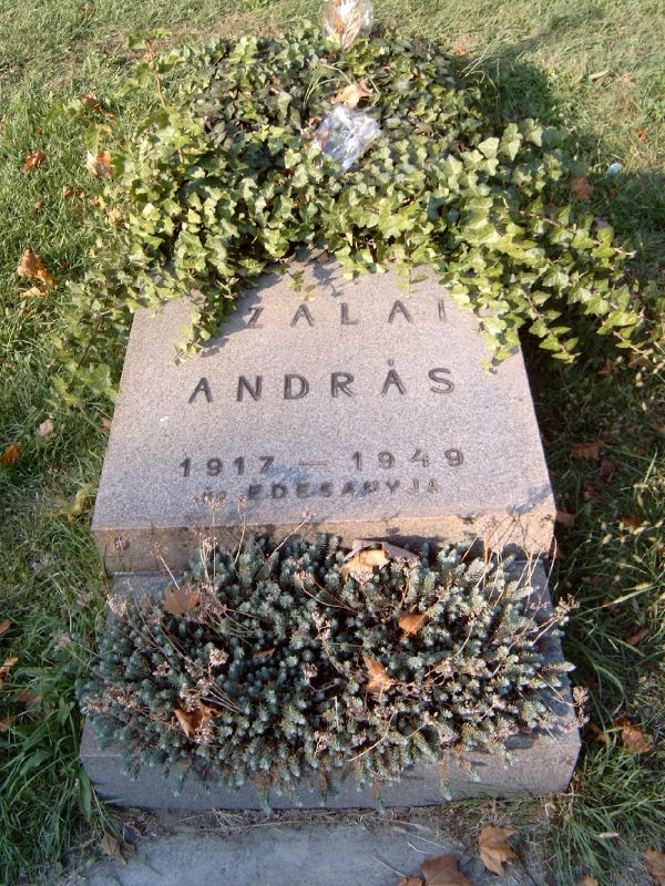 Szalai András (Pécs, 1917. febr. 6. – Bp., 1949. okt. 15.) politikus sírja Budapesten. Kerepesi temető: Mm. B. 5.